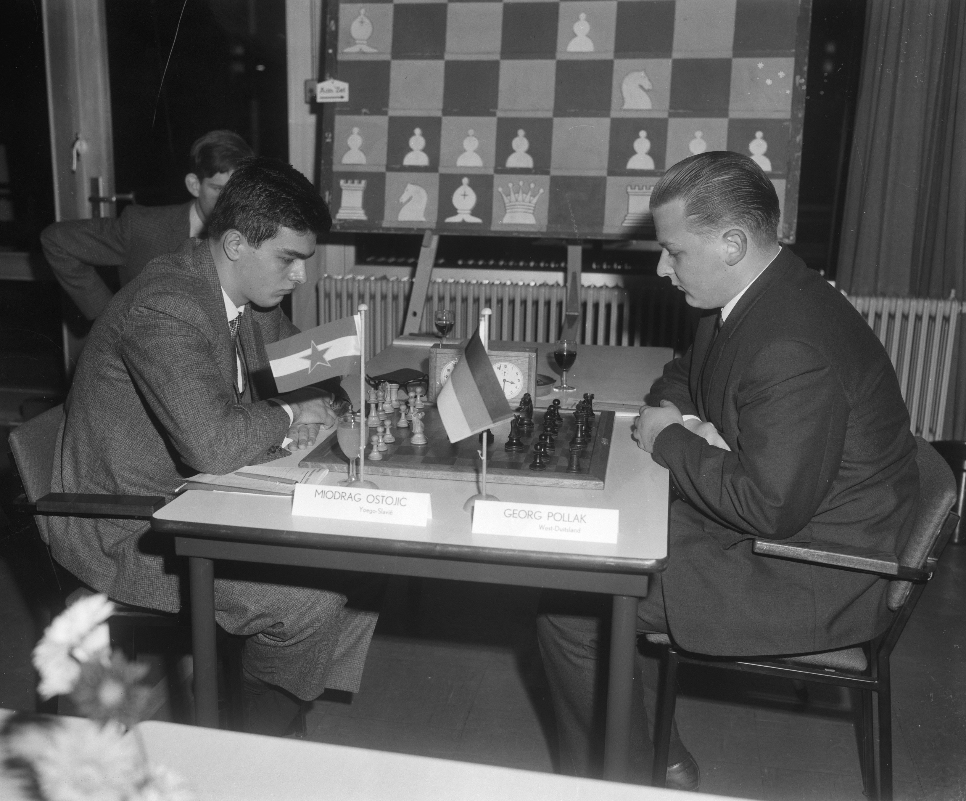 Collectie / Archief : Fotocollectie Anefo Reportage / Serie : [ onbekend ] Beschrijving : Internationaal Jeugd Schaaktoernooi te Groningen, Miodrag Ostojic (Joegoslavië) en Georg Pollak (West-Duitsland) Datum : 27 december 1965 Locatie : Groningen Trefwoorden : schaken, sport Persoonsnaam : Ostojic, Miodrag, Polak, George Fotograaf : Bilsen, Joop van / Anefo Auteursrechthebbende : Nationaal Archief Materiaalsoort : Negatief (zwart/wit) Nummer archiefinventaris : bekijk toegang 2.24.01.04 Bestanddeelnummer : 918-6109